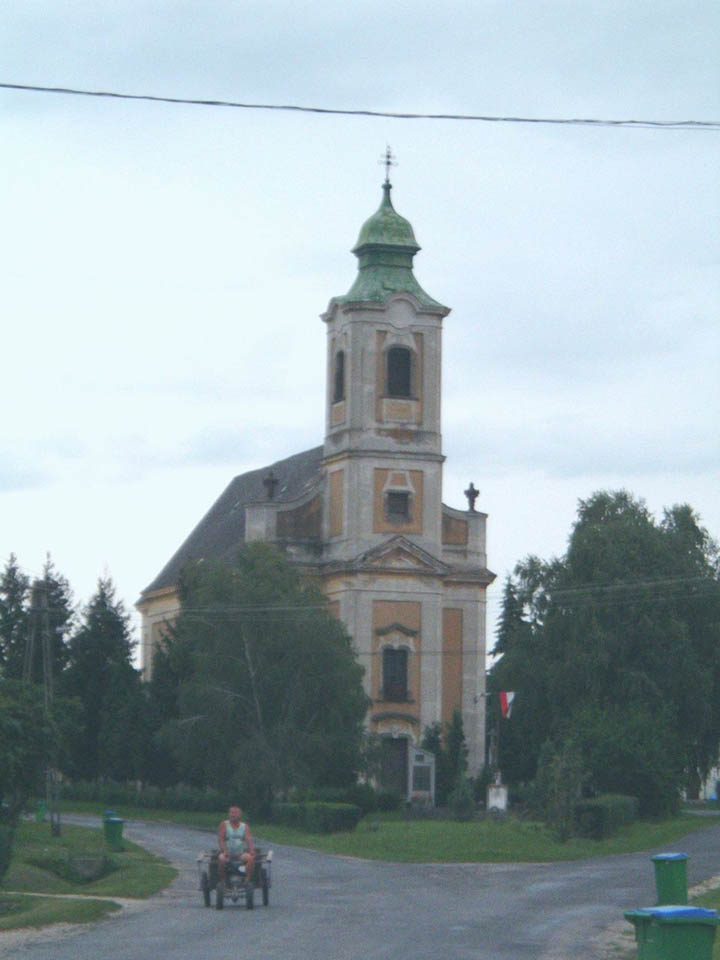 The church of Pápateszér, Hungary. Szűz Mária Neve római katolikus templom